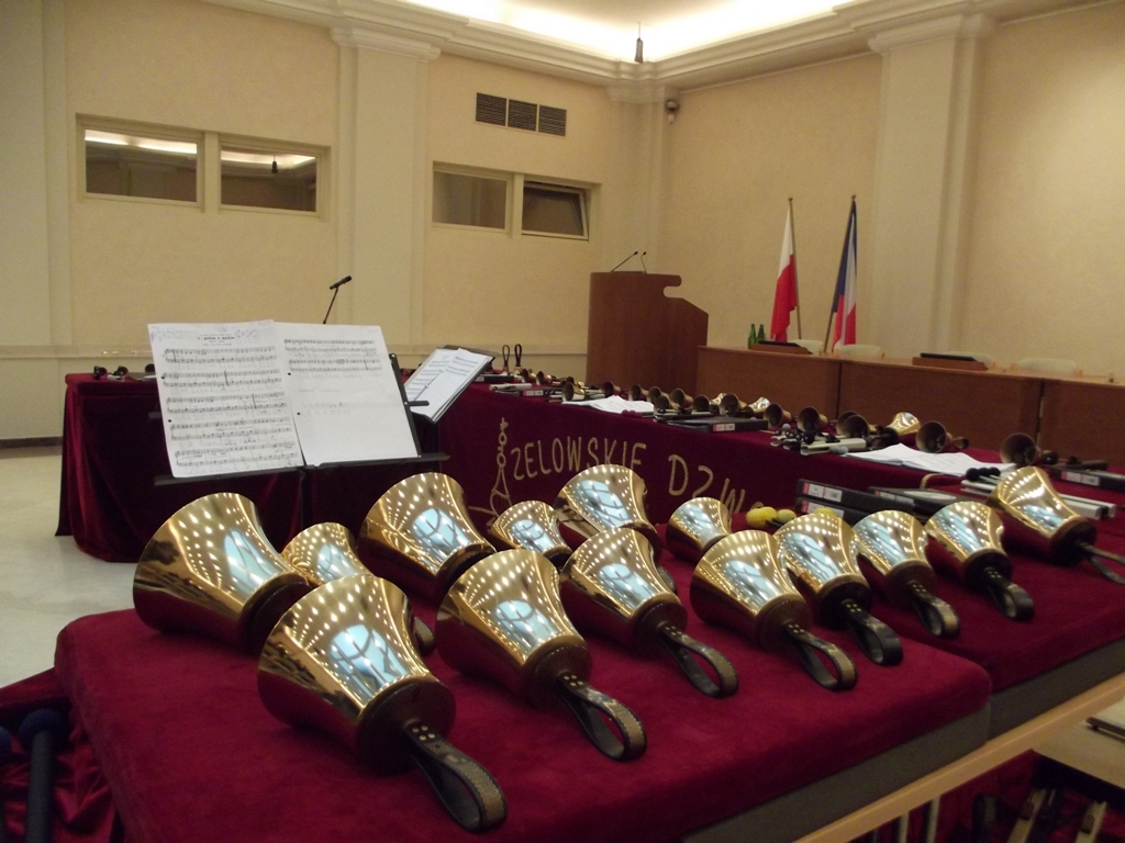 Zdjęcie zrobione podczas wizyty pary prezydenckiej Republiki Czeskiej w Krakowie.